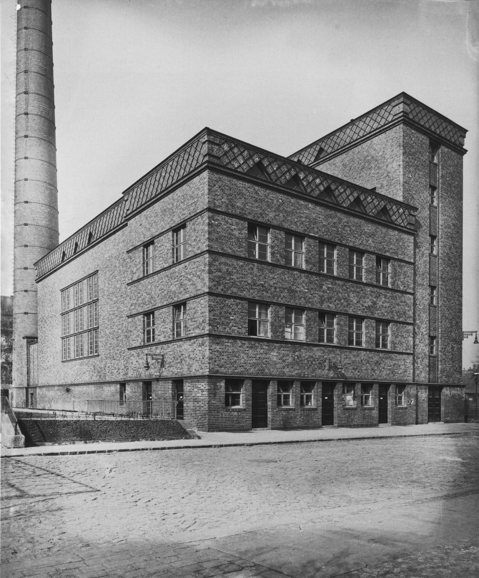 Das 1925/26 errichtete Kesselhaus des Kinderkrankenhauses in der Oststraße.Entwurf Stadtbaurat Hubert Ritter.